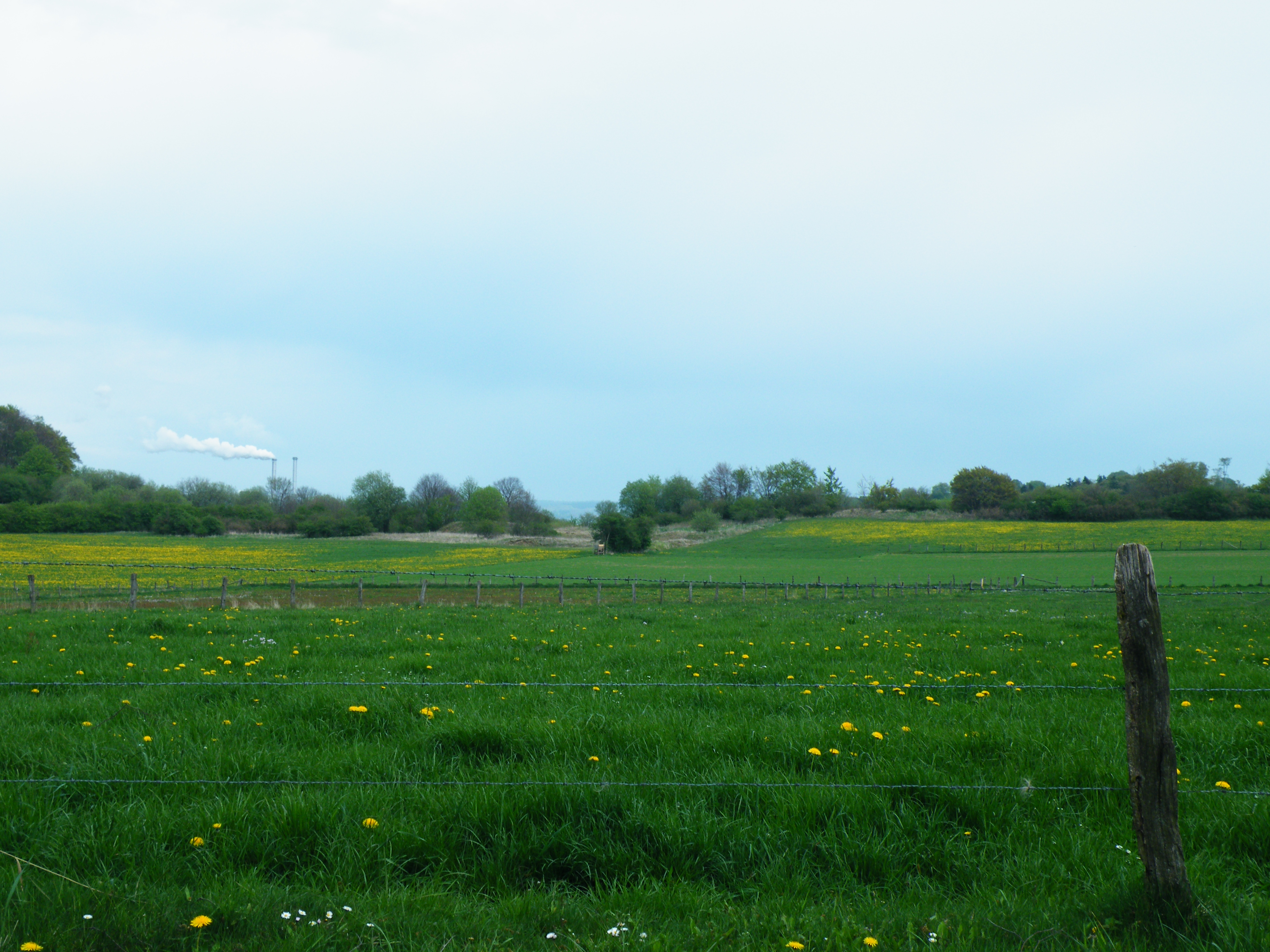 Vorne Bereiche vom Landschaftsschutzgebiet Offenland südöstlich Brilon, dahinter Bereiche vom Landschaftsschutzgebiet Grünlandkomplex am Frettholz; hinten bei den Gehölzen Bereiche vom Naturschutzgebiet Frettholz; im Hintergrund zwei kamine der Fima Egger